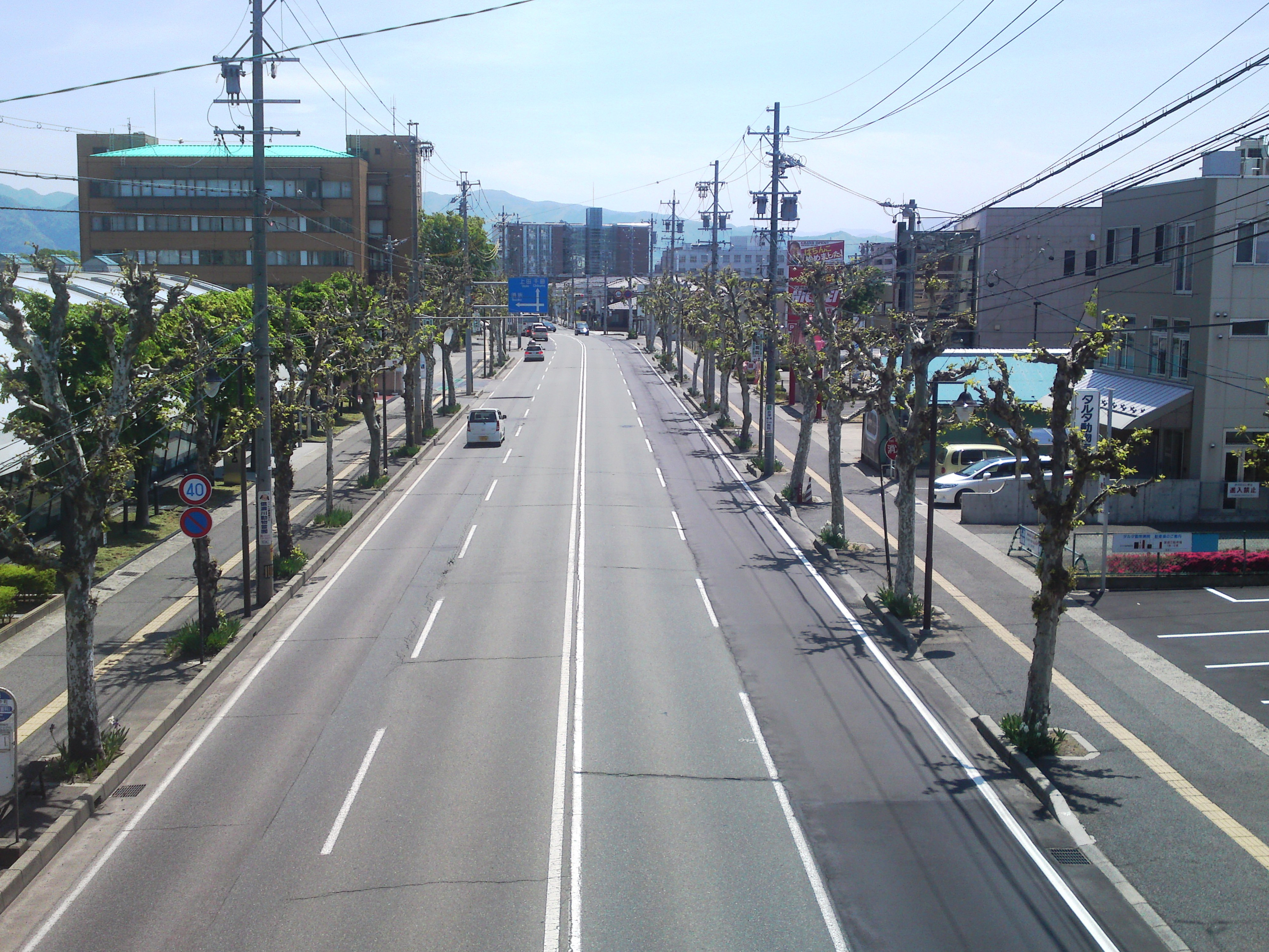 東通り（長野県長野市七瀬中町）